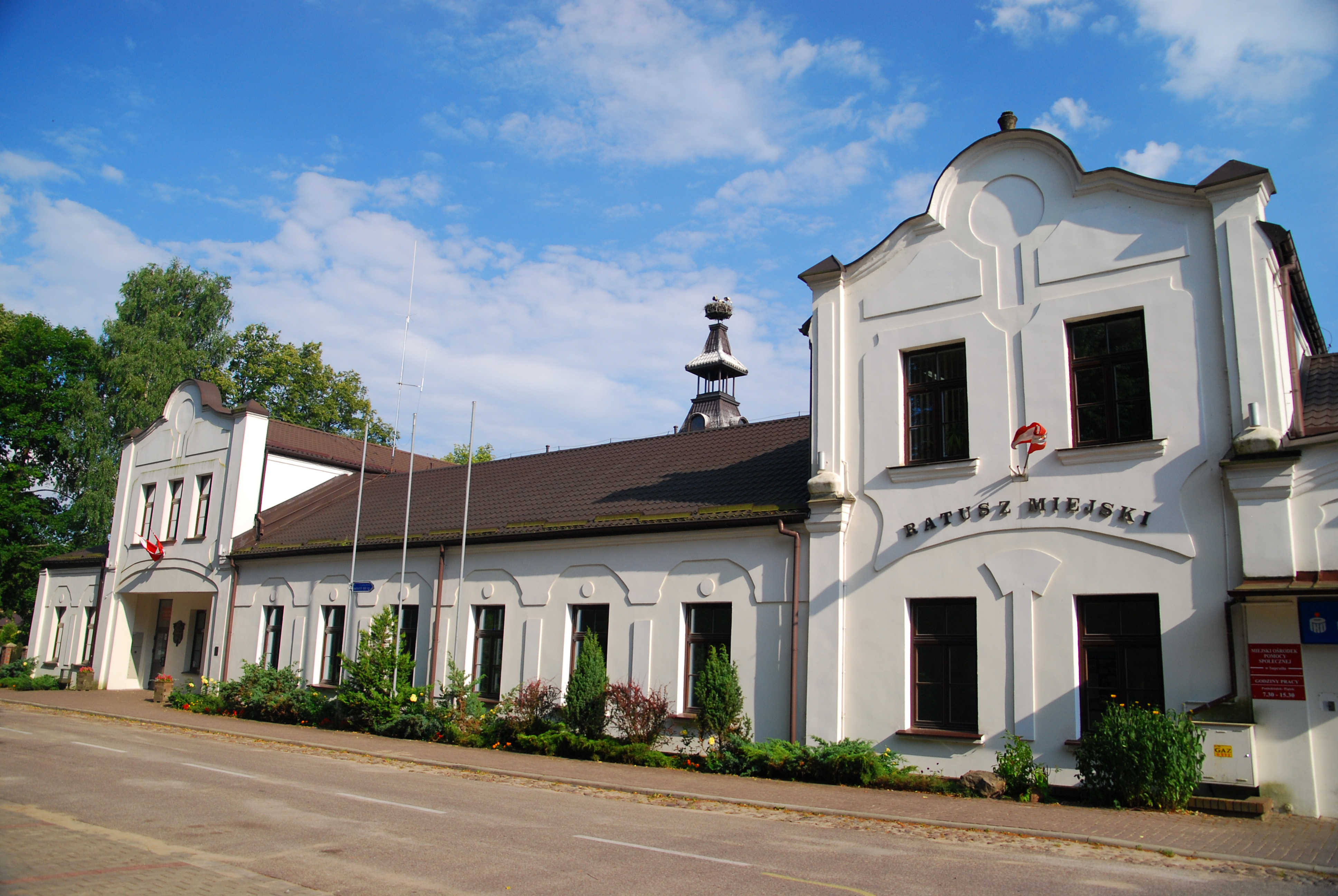 Supraśl, ul. Piłsudskiego 60 - dawna szkoła, obecnie ratusz miejski This photo from Podlaskie Voievodeship was taken during Polish Wikiexpedition 2009 set up by Wikimedia Polska Association. The making of this document was supported by Wikimedia Polska.